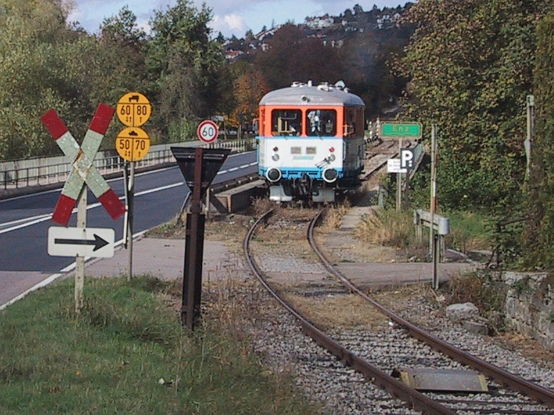 WEG VT04 bei Enzweihingen